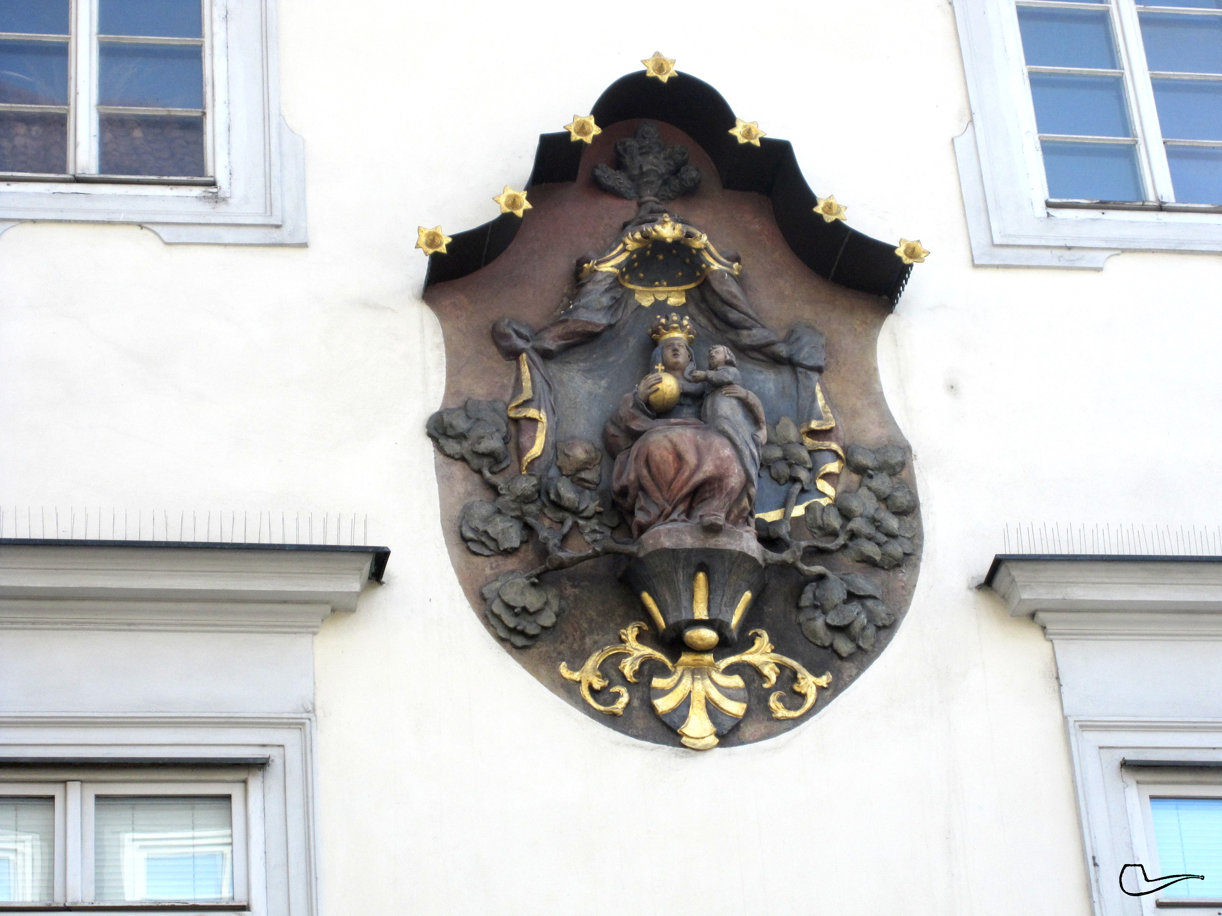 0241 Panna v Perlovce